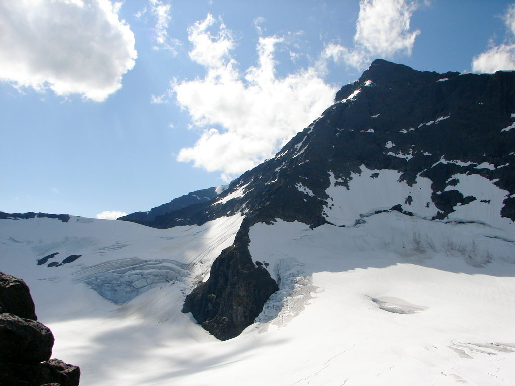 Storglaciärens ackumulationsområde